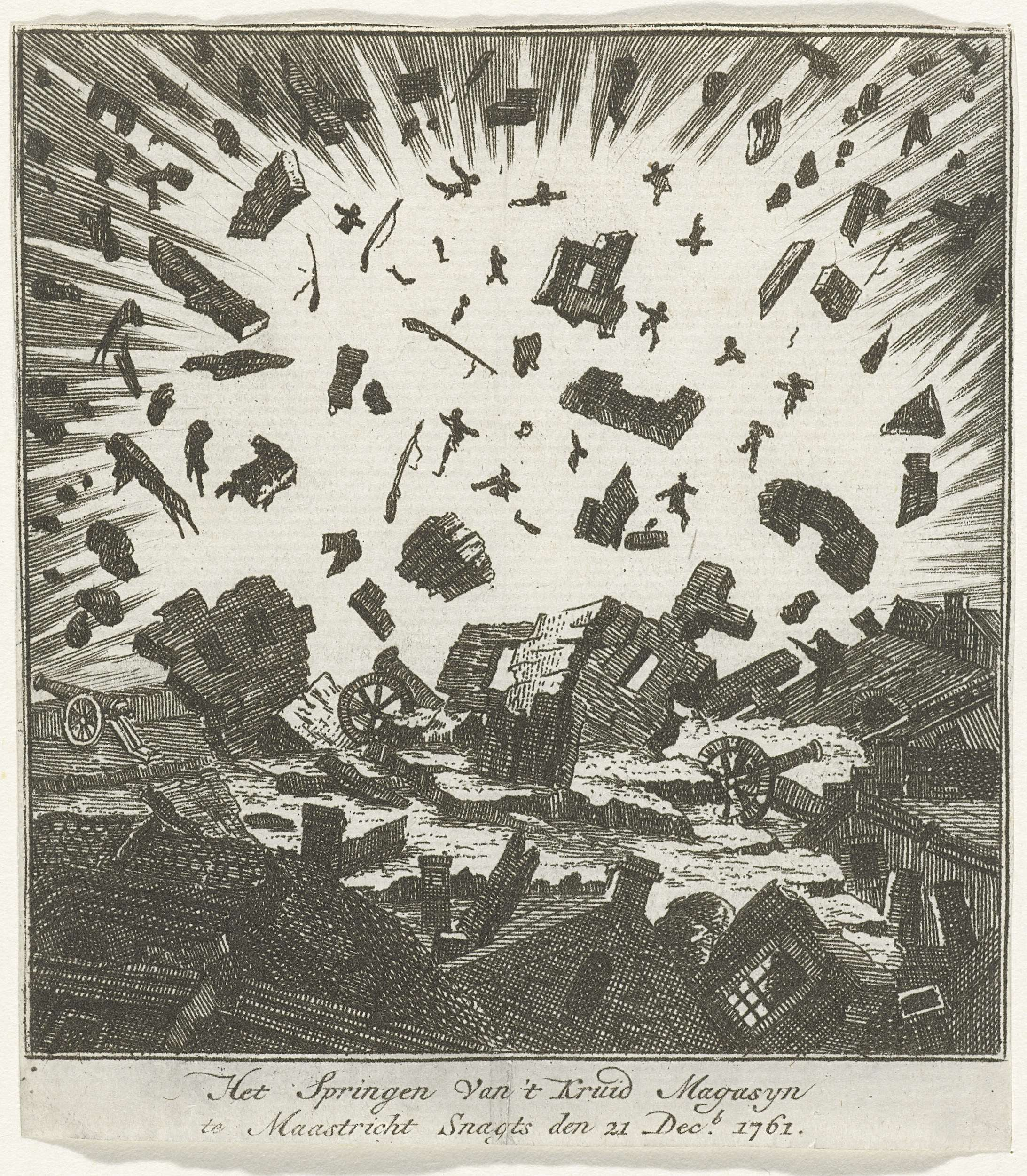 De ontploffing van het kruitmagazijn bij het Sint-Servaasbolwerk in Maastricht op 21 december 1761. Door de explosie worden brokstukken van het gebouw en mensen de lucht in geblazen. Collectie Rijksmuseum Amsterdam, RP-P-OB-84.563.